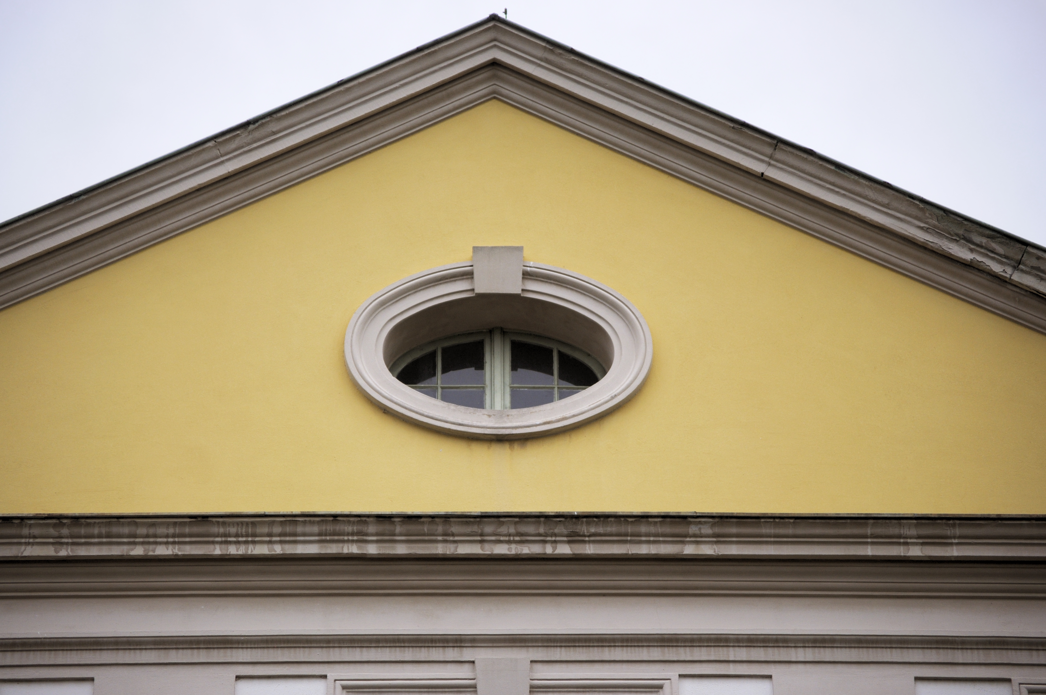 Dieses Foto entstand im Rahmen des Projekts Wiki Loves Monuments Mittelhessen, das aus dem Community-Projektbudget von Wikimedia Deutschland e. V. gefördert wurde.